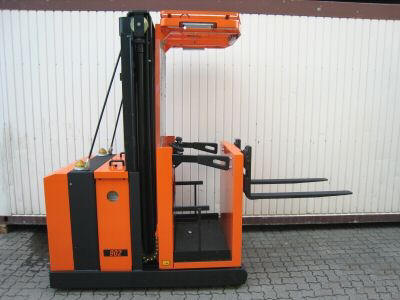 Elektrischer Hochhubkommissionierer OMG 902, Baujahr 2002, zweifaches Hubgerüst, Polyurethanreifen Hubhöhe: 4050 mm, Eigengewicht: 2900 kg, Gabellänge: 1000 mm, Tragfähigkeit: 800 kg, Bauhöhe: 2400 mm